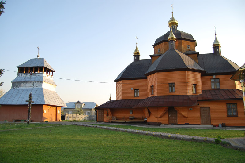 Церква Різдва Пресвятої Богородиці